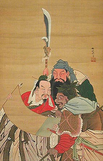 Lưu Bị (trái), Quan Vũ (sau) và Trương Phi (phải) trong một tranh minh họa của "Tam Quốc Diễn Nghĩa". Ba người anh hùng trong Tam quốc, tranh lụa của Sekkan Sakurai (1715-1790), trên trang chủ, The Field Museum. Bân-lâm-gú: Lâu-pī, Kuan-ú, Tiunn-hui (tsó tsì iū). 劉備、關羽、張飛（左至右）。